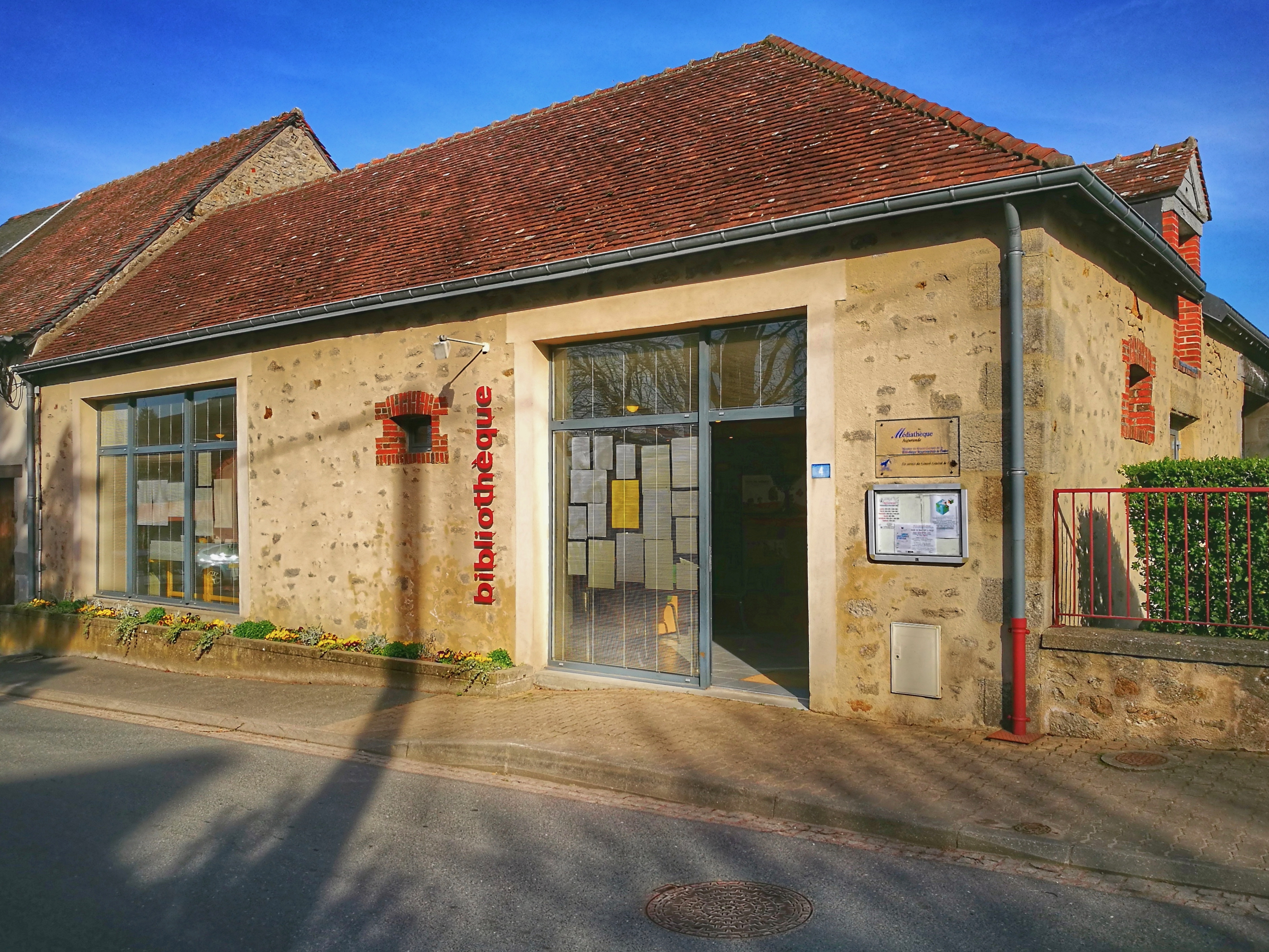 Vue de l'entrée de la Médiathèque d'Aigurande.